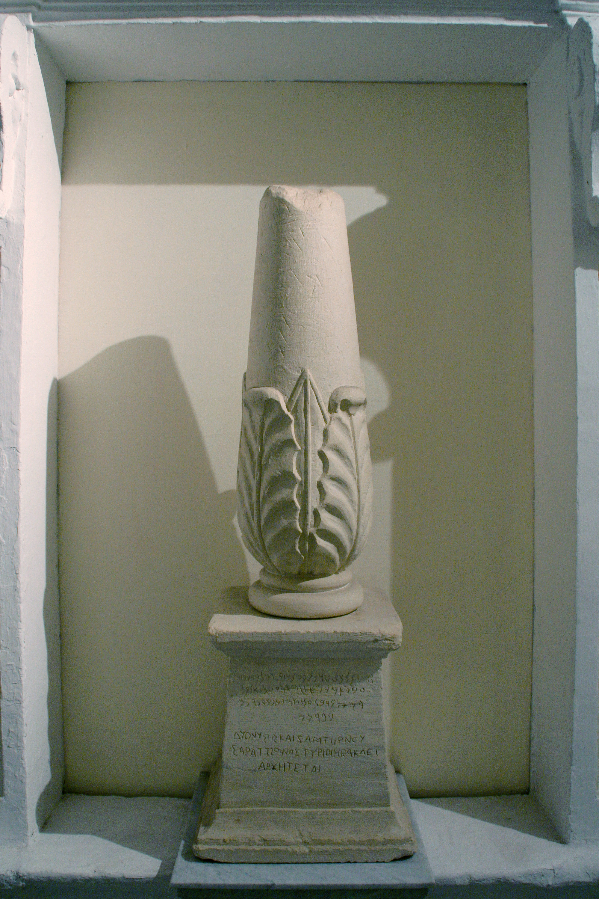 Cippe phénicien trouvé sur l'île de Malte et ayant permis pour la première fois de comprendre le phénicien grâce à sa double inscription phénicien-grec. Cet exemplaire se trouve à La Vallette au ministère des affaires étrangères, un autre exemplaire très semblable se trouve au musée du Louvre à Paris